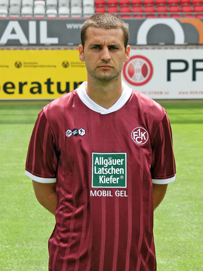 Stiven Rivic, Fußballspieler